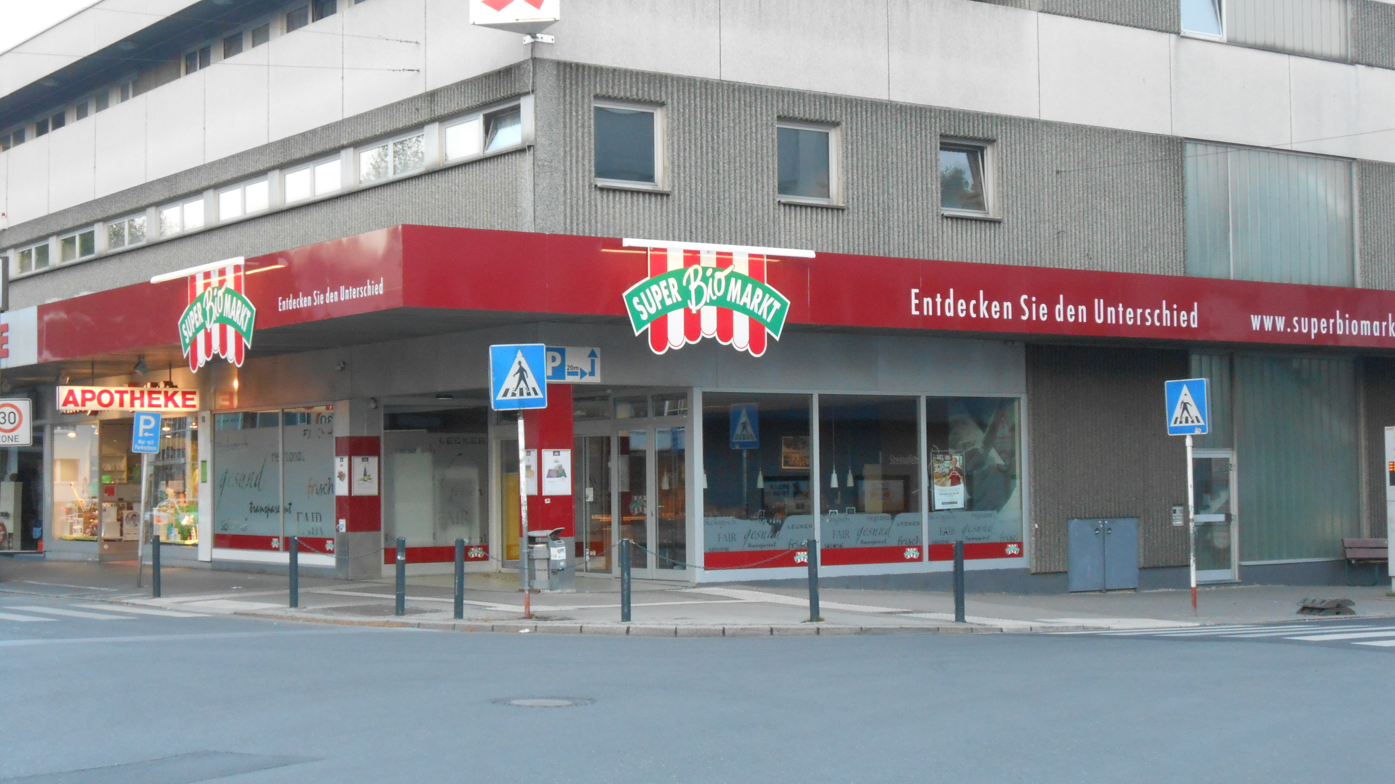 Filiale der SuperBiomärkte in Dortmund-Hombruch, Samstag nachmittag (7. Mai 2016).